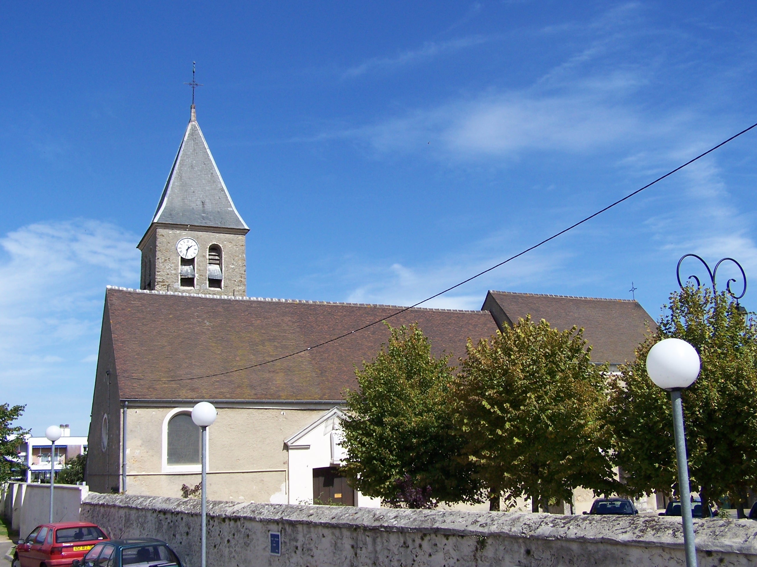 Église des Clayes-sous-Bois (Yvelines, France). Photo personnelle. Church of Les Clayes-sous-Bois (Yvelines, France). Personal photo. Auteur/Author : Henry Salomé